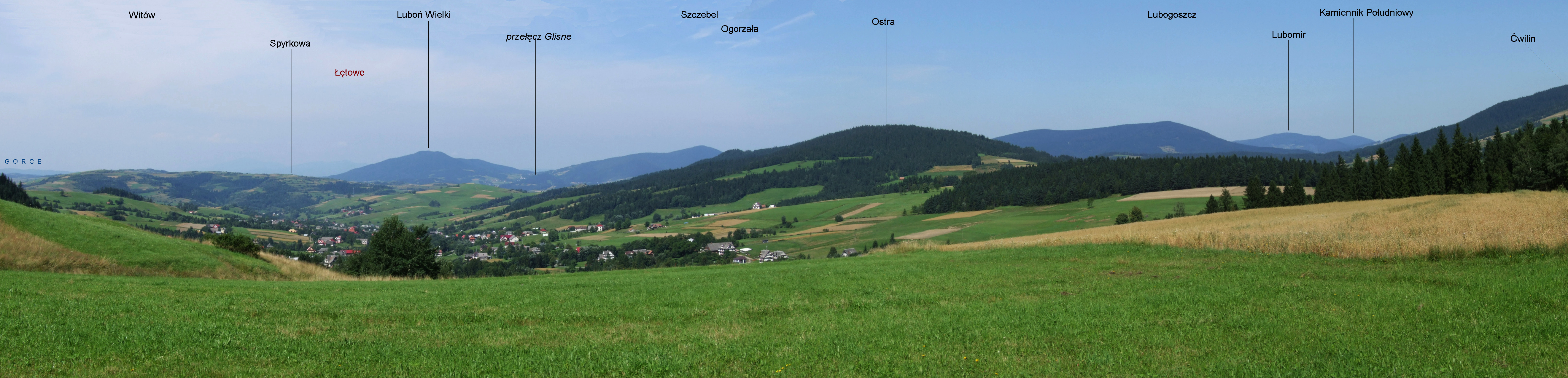 Łętowe, panorama spod Kiczory (Kobylicy)